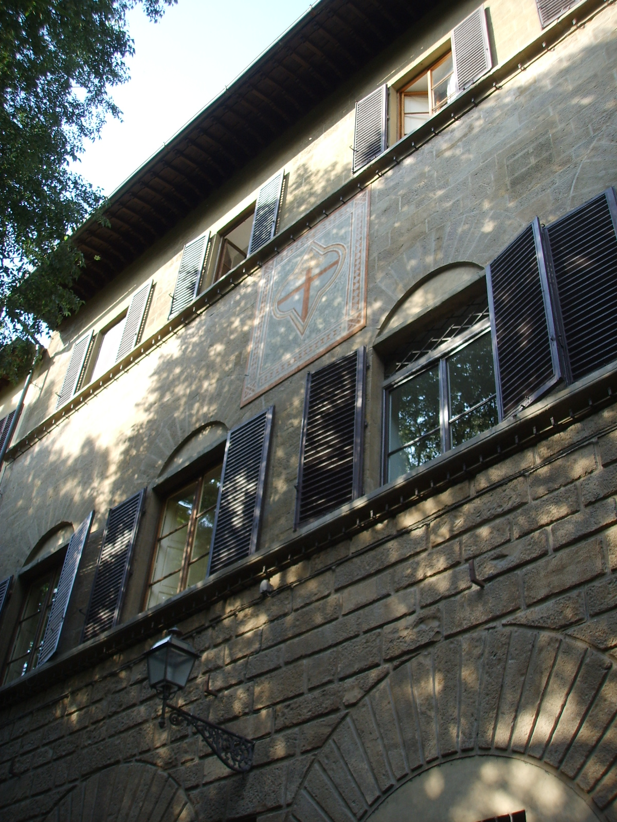 Palazzo Canigiani or Bardi-Larioni or degli Ilarioni